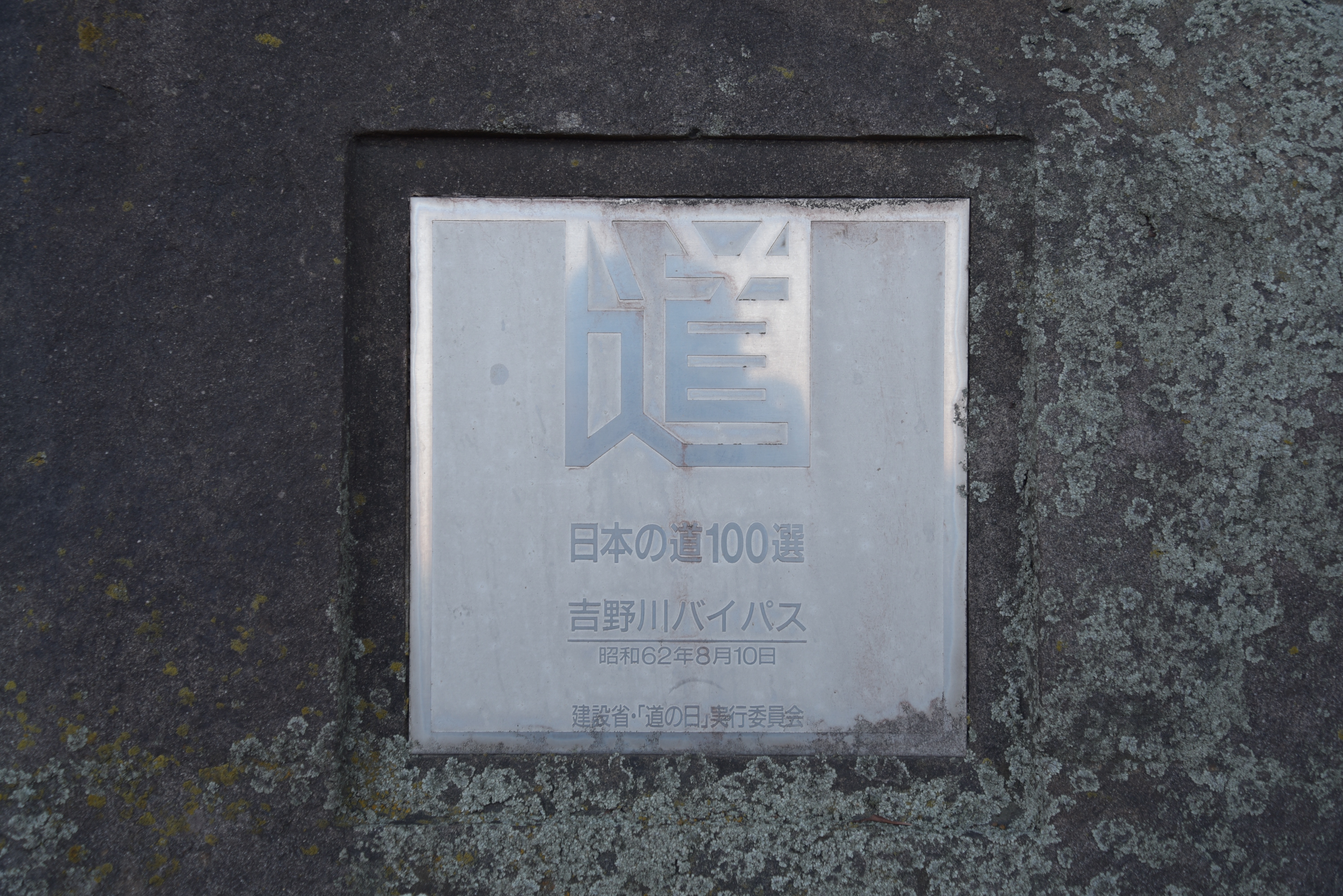 日本の道百選顕彰碑